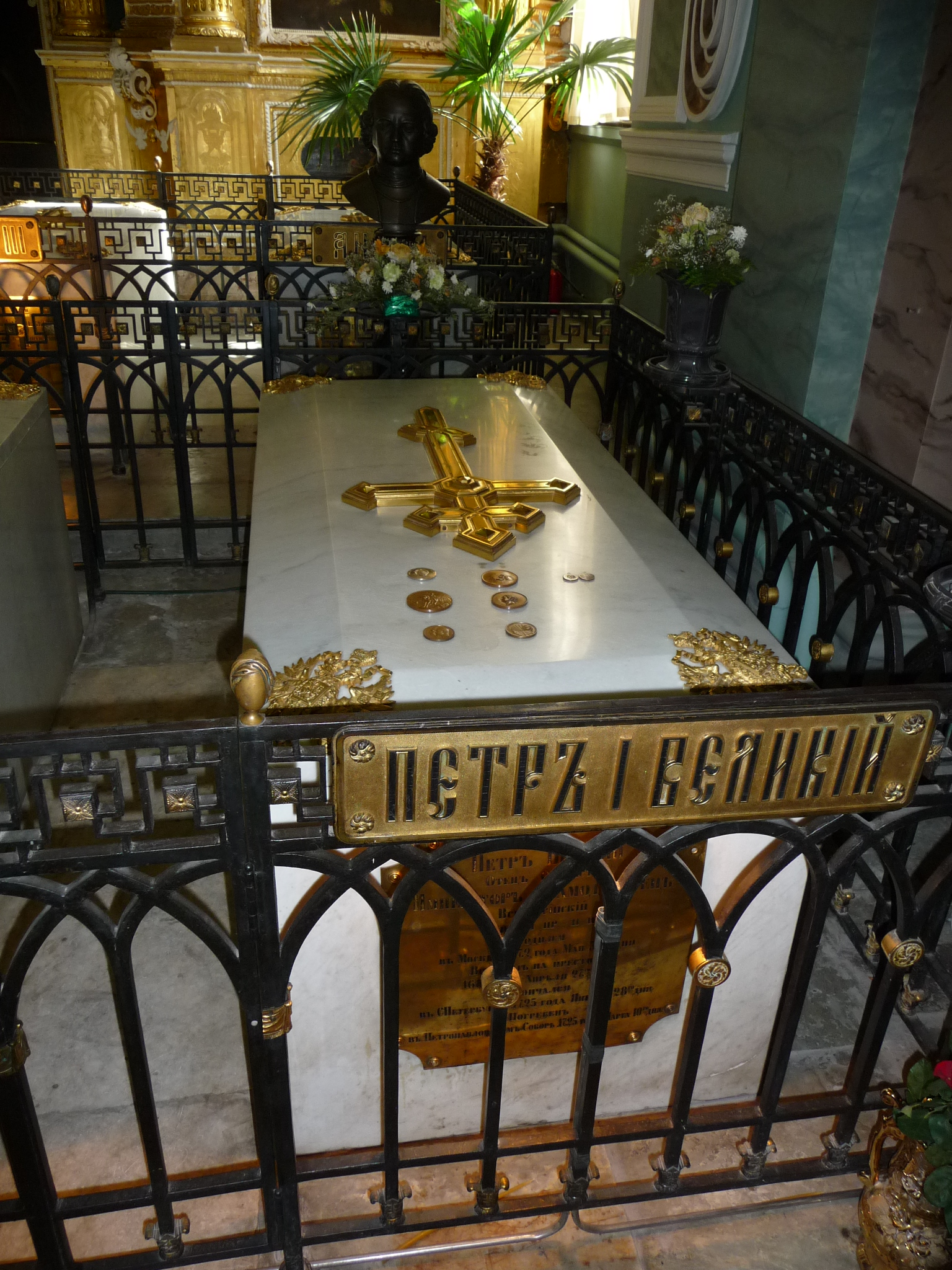 RussianTzarsTumbs-p1030584.jpg